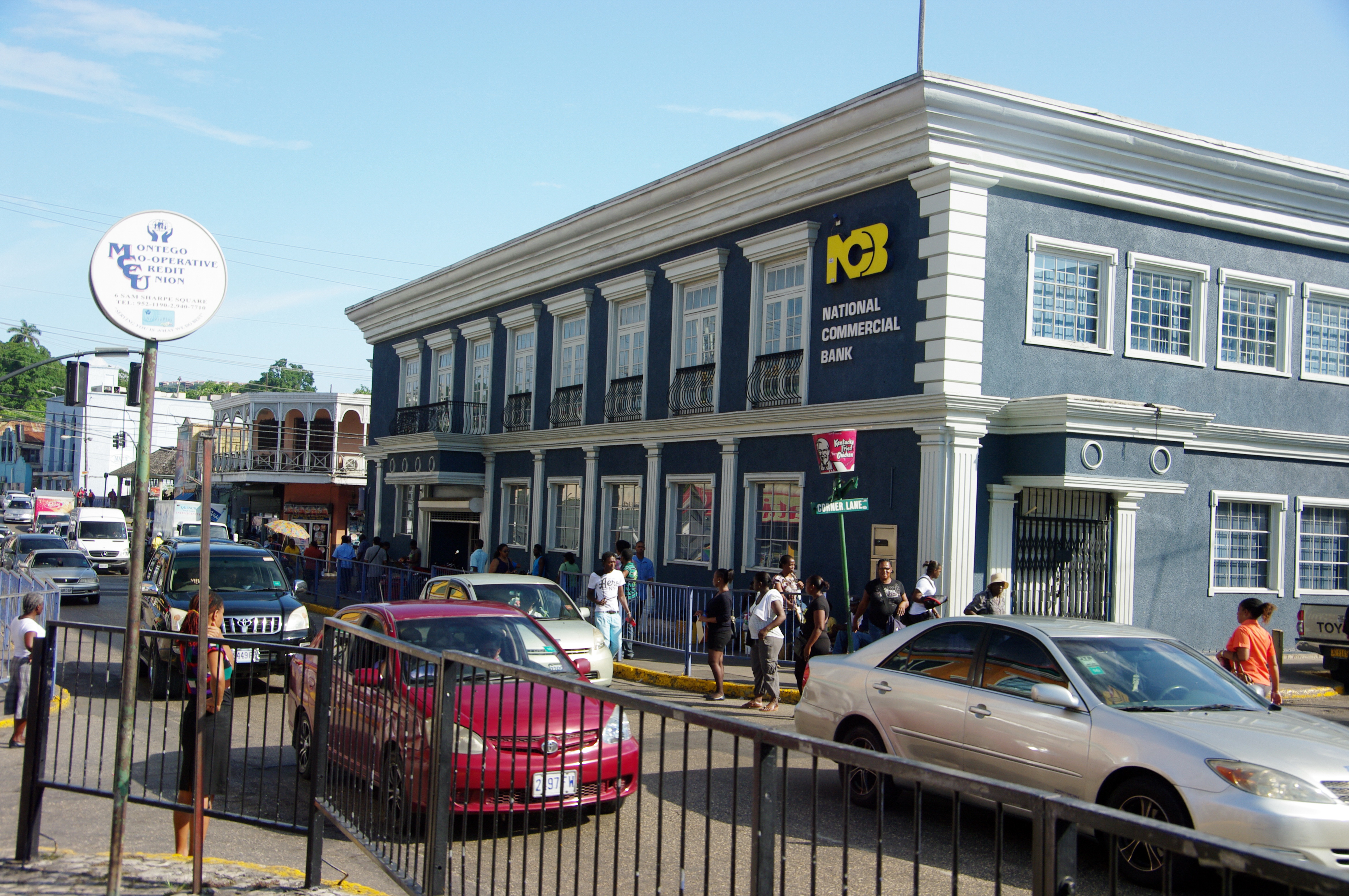 Bank im Stadtzentrum